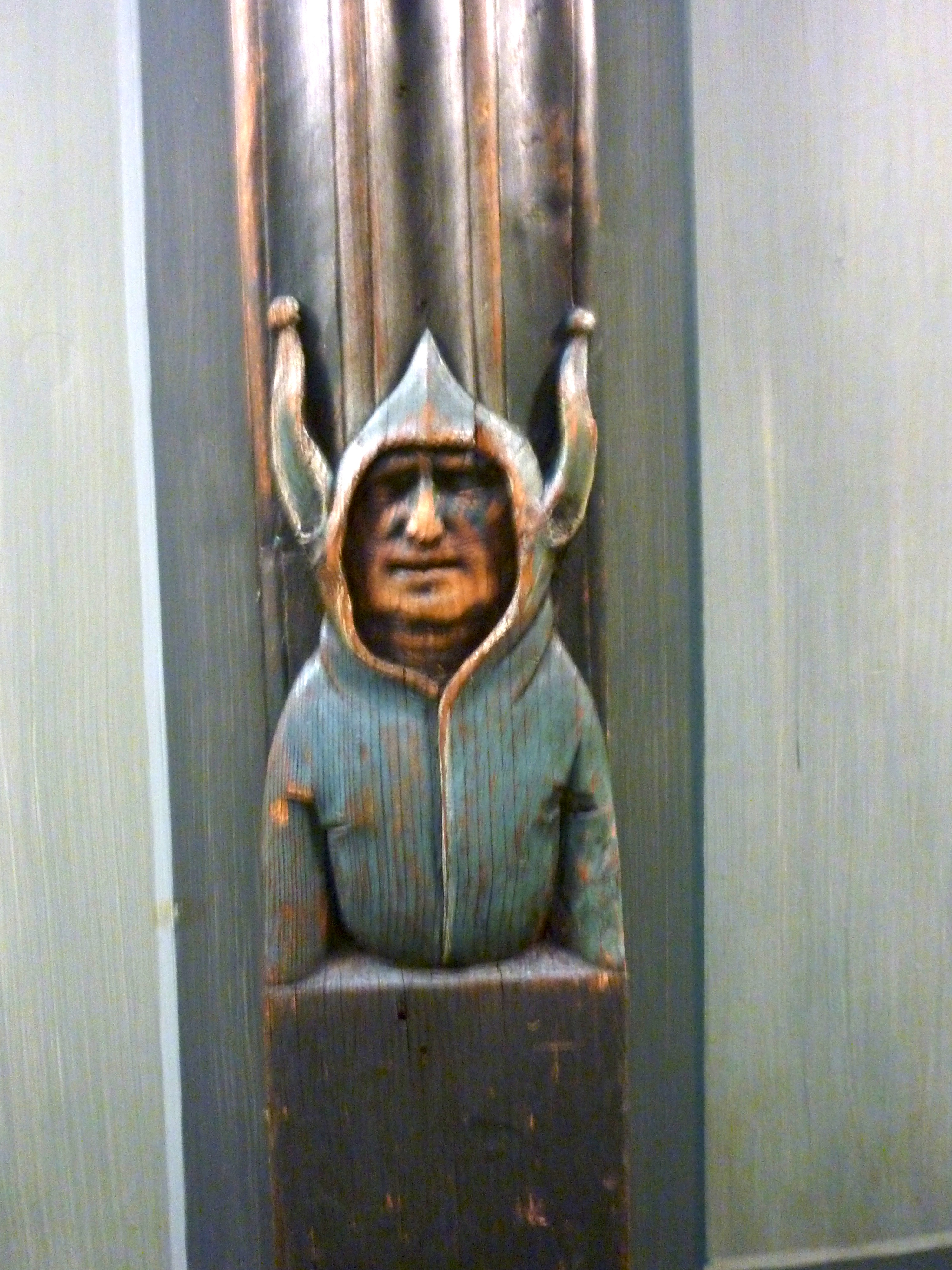 Ritterhäuser Uerikon: geschnitzter Narrenkopf im Ritterhaus